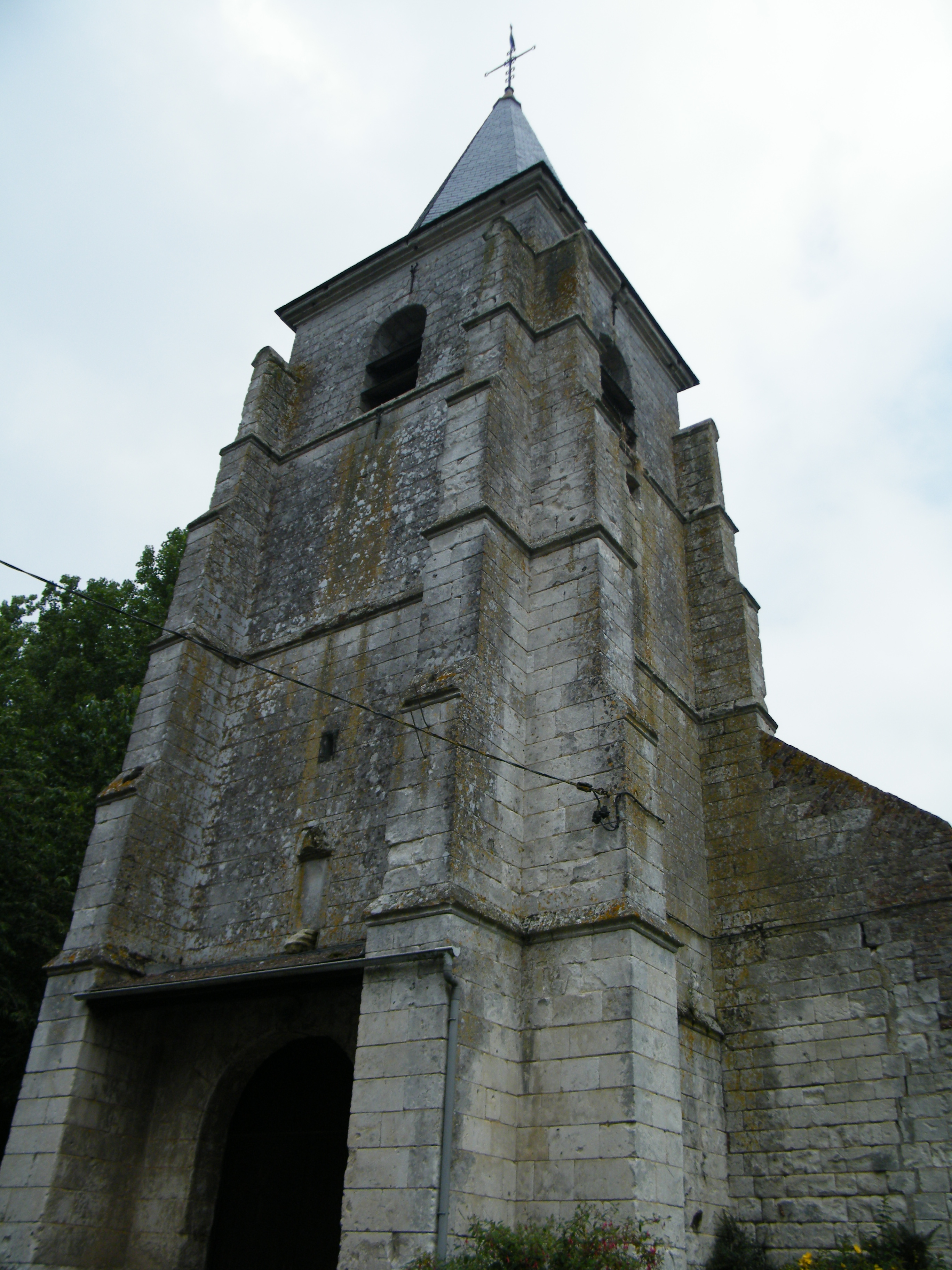 Vue du clocher.